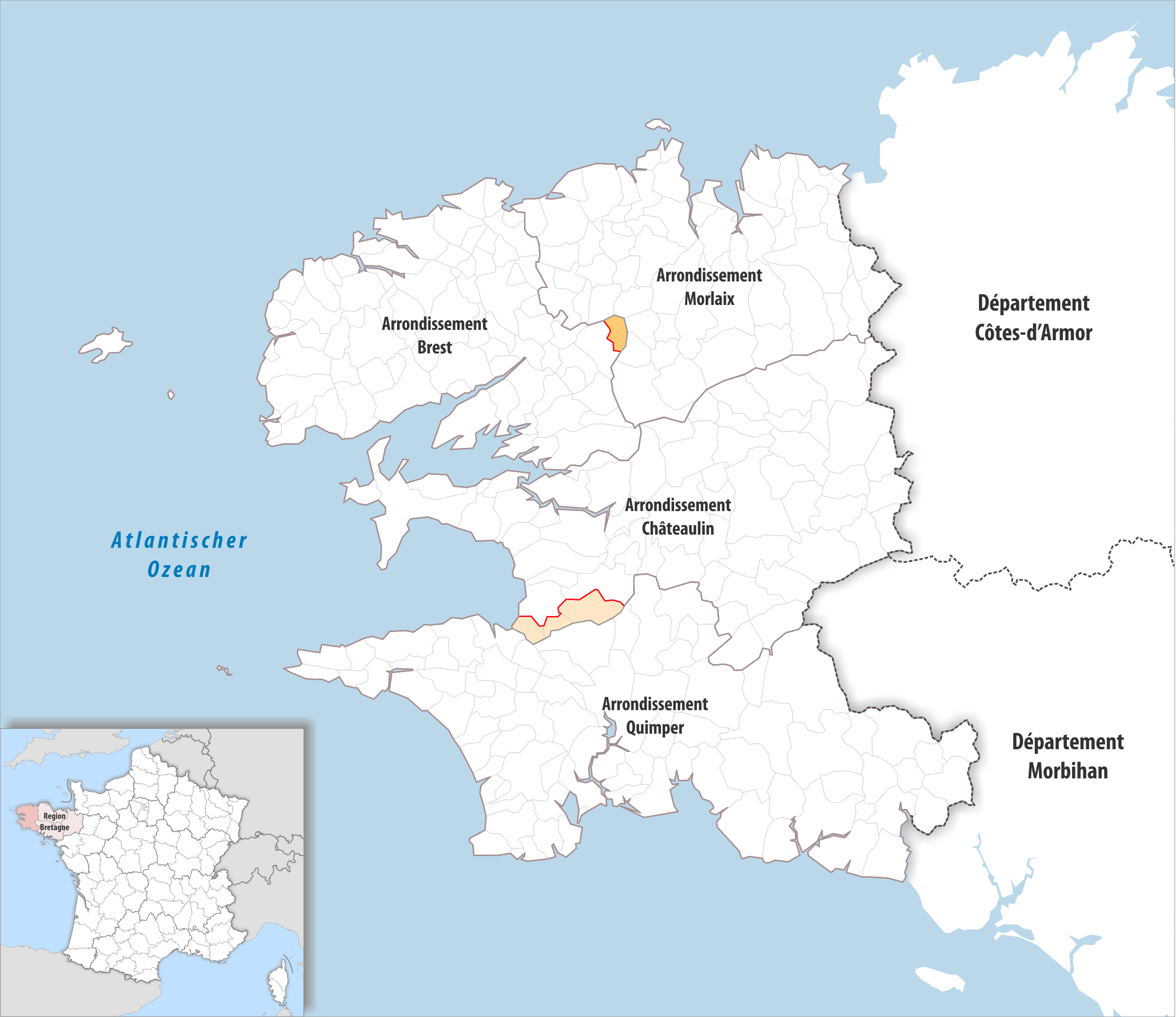 Arrondissements Anpassungen auf 2017 im Departement Finistère